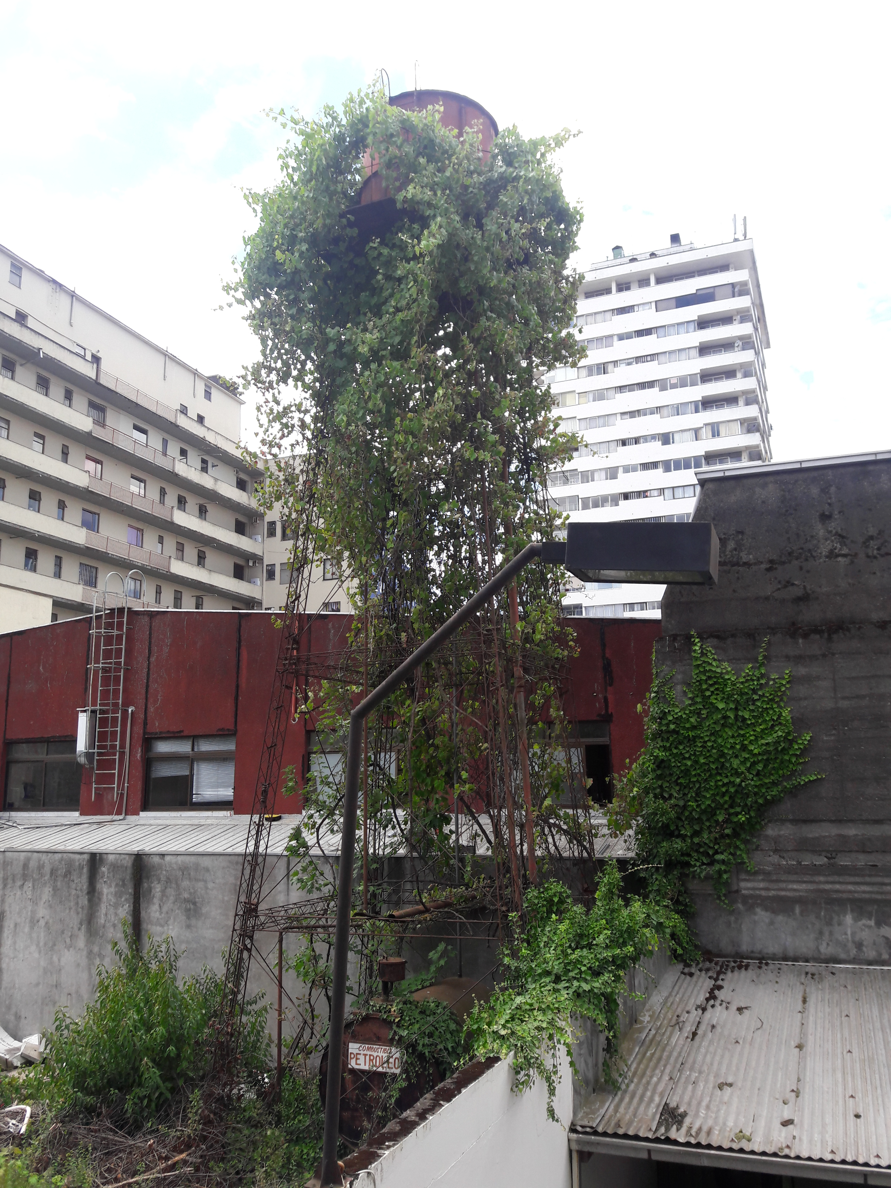 Estructura para petróleo del Hotel Continental, monumento nacional de Chile, ubicado en el Sector Centro de la ciudad de Temuco.